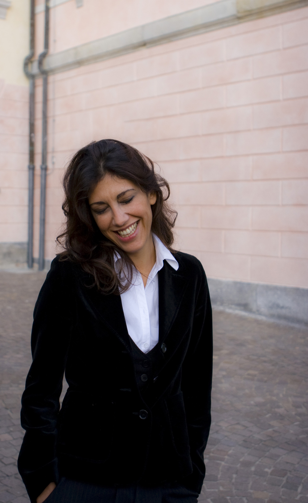 Gaia Manzini